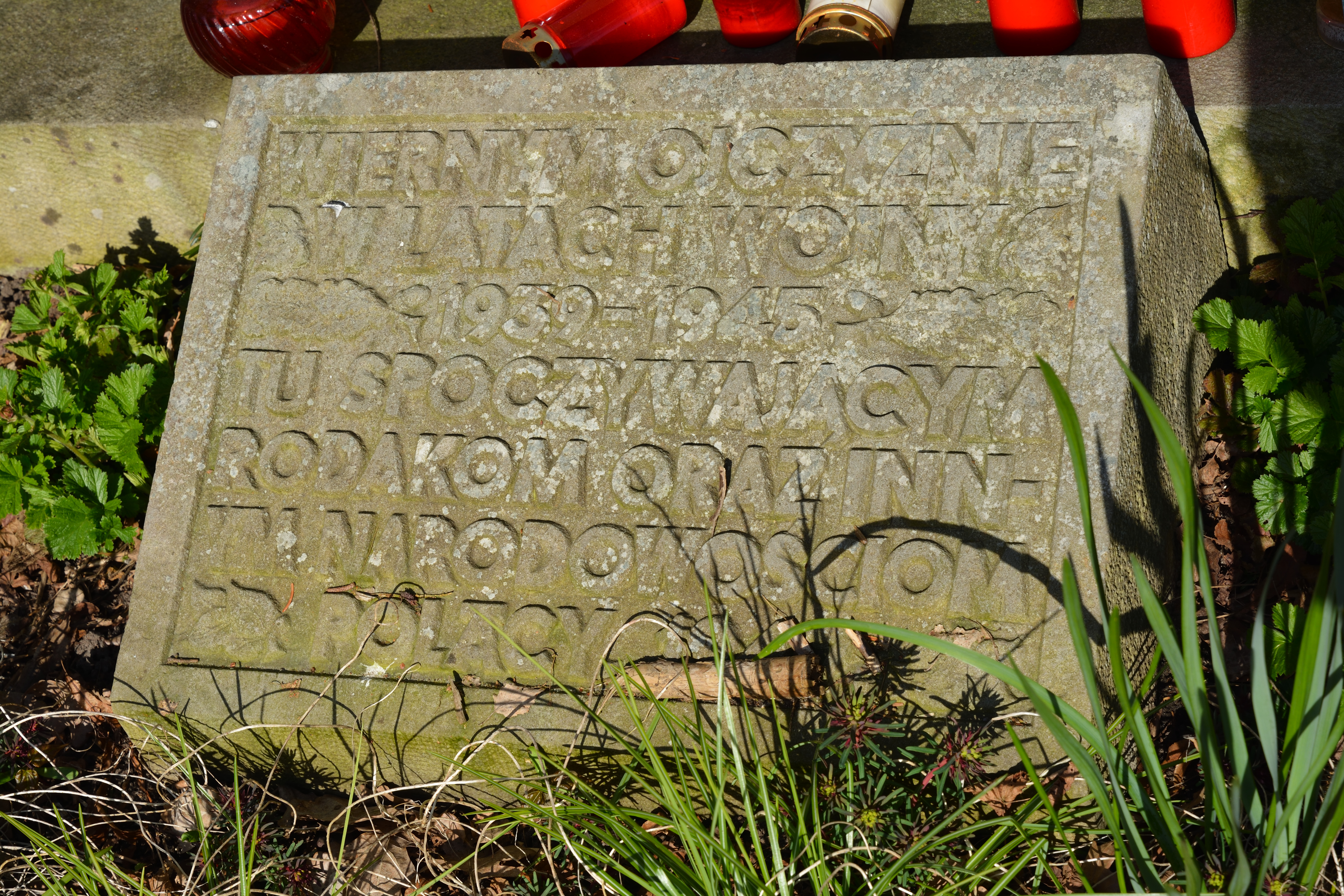 Bilder vom Nordfriedhof in Neumünster Inschrift: Treu dem Vaterland in den Kriegsjahren 1939–1945 ruhen hier Landsmänner sowie anderer Völker. Polen - Polen im Sinne der Leute - also "Die Polen" [1]